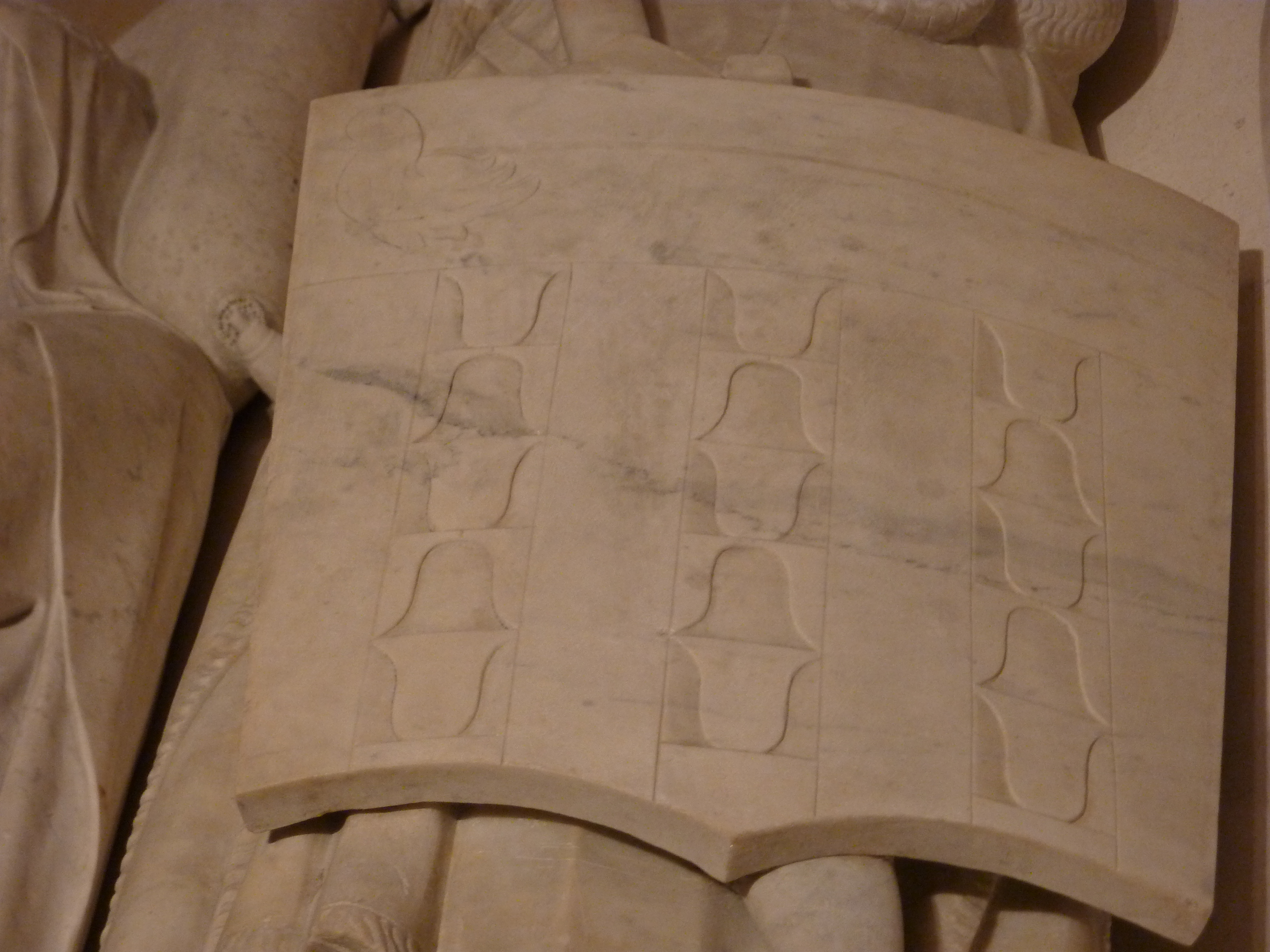 De gueules, à trois pals de vair, au chef d'or, chargé d'une merlette de sable, au franc-quartier